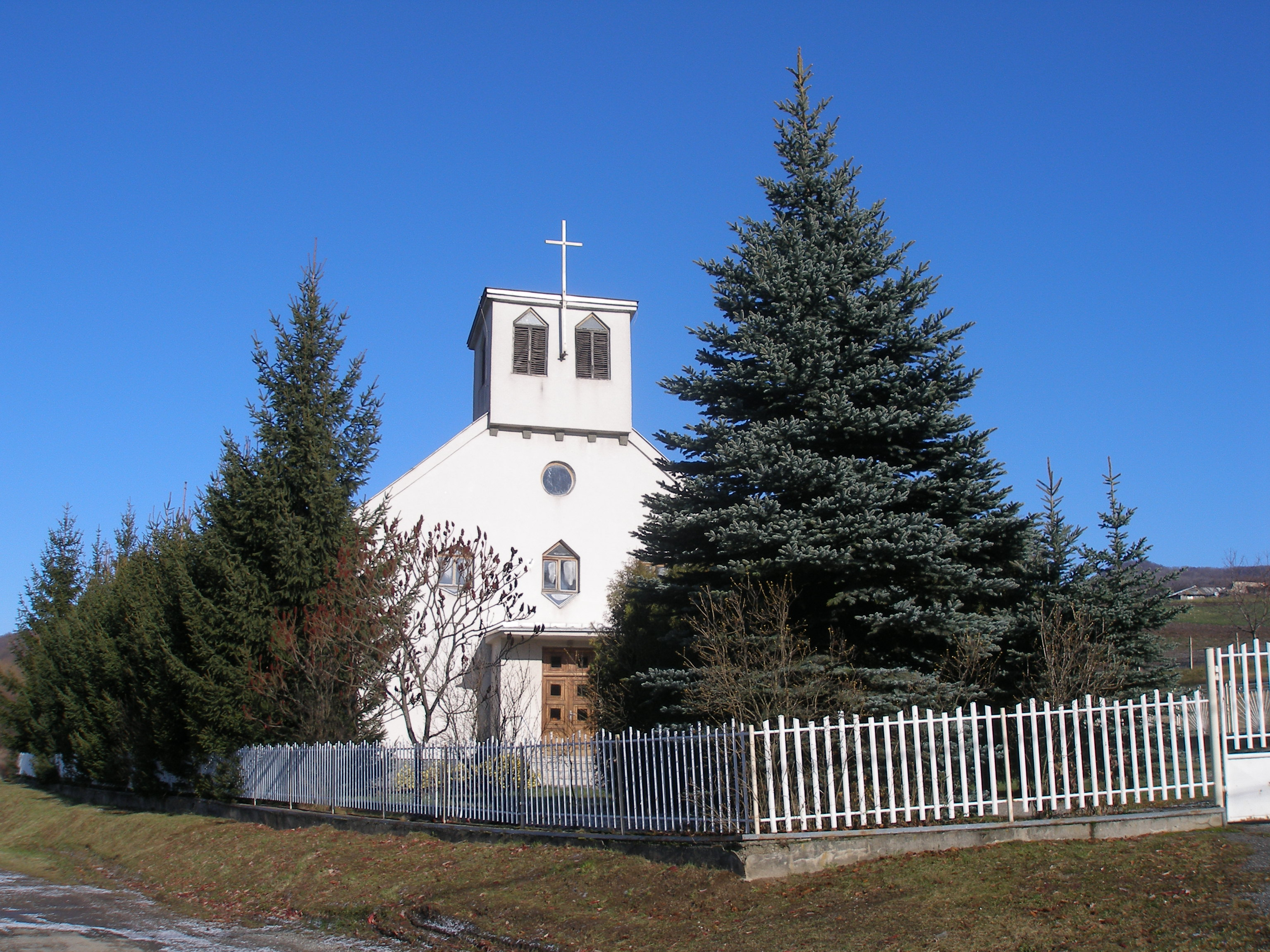 Obec Lesíček v okrese Prešov